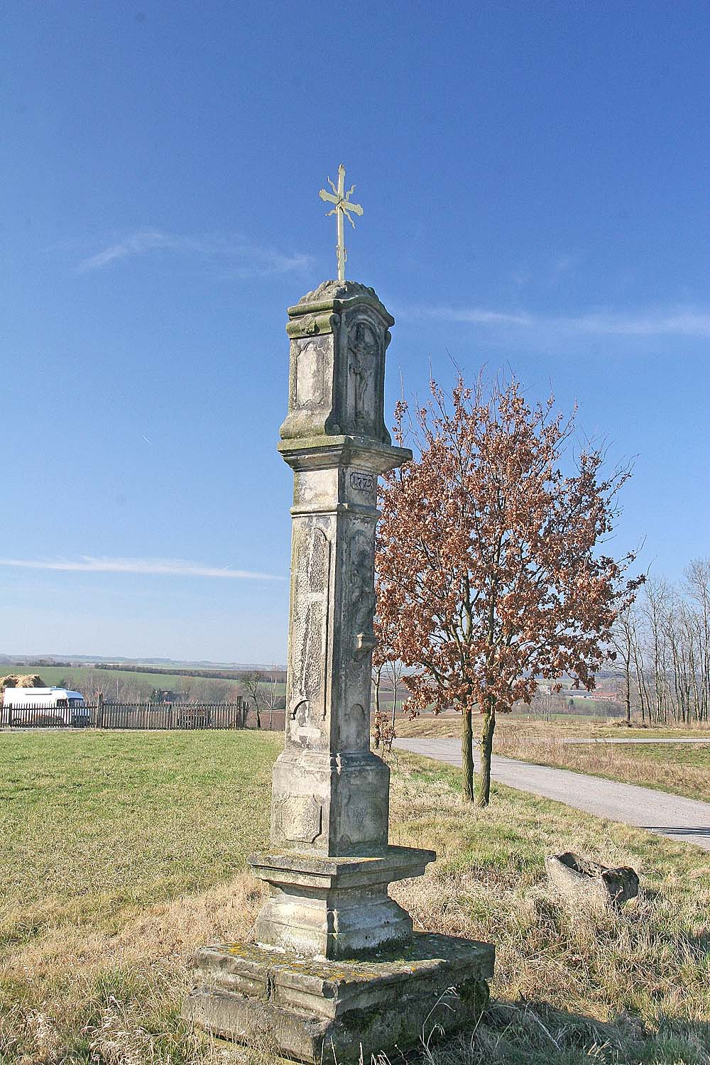 Chyjice, okres Jičín. Boží muka u kostela svatého Šimona a Judy.